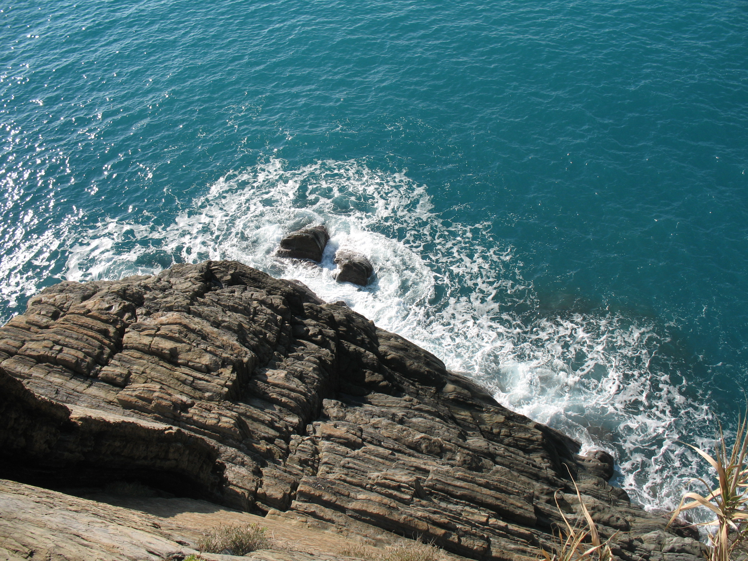 Immagine dalle Cinque Terre Via dell'Amore